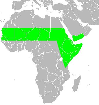 Areale specie